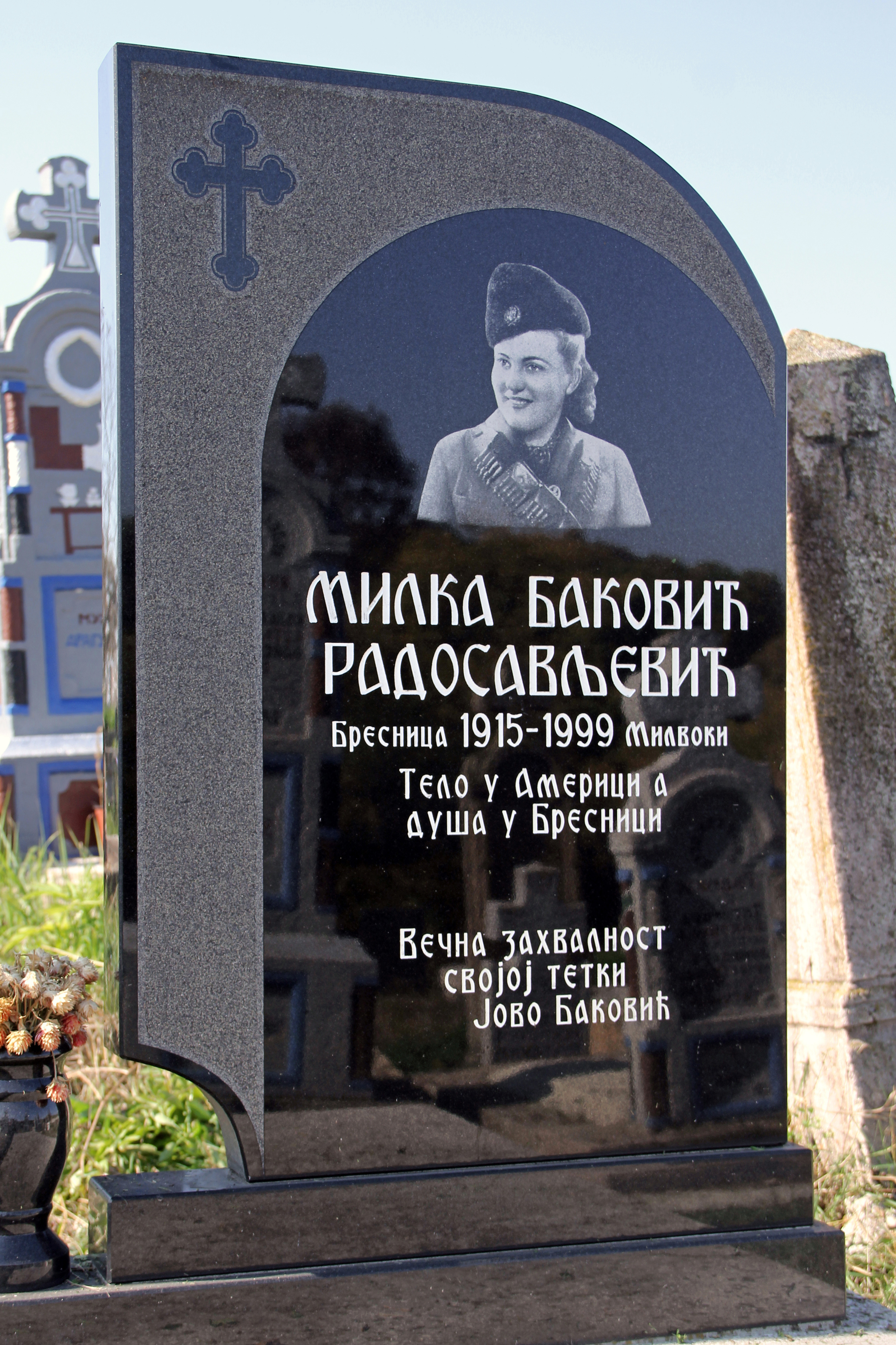 Bresnica